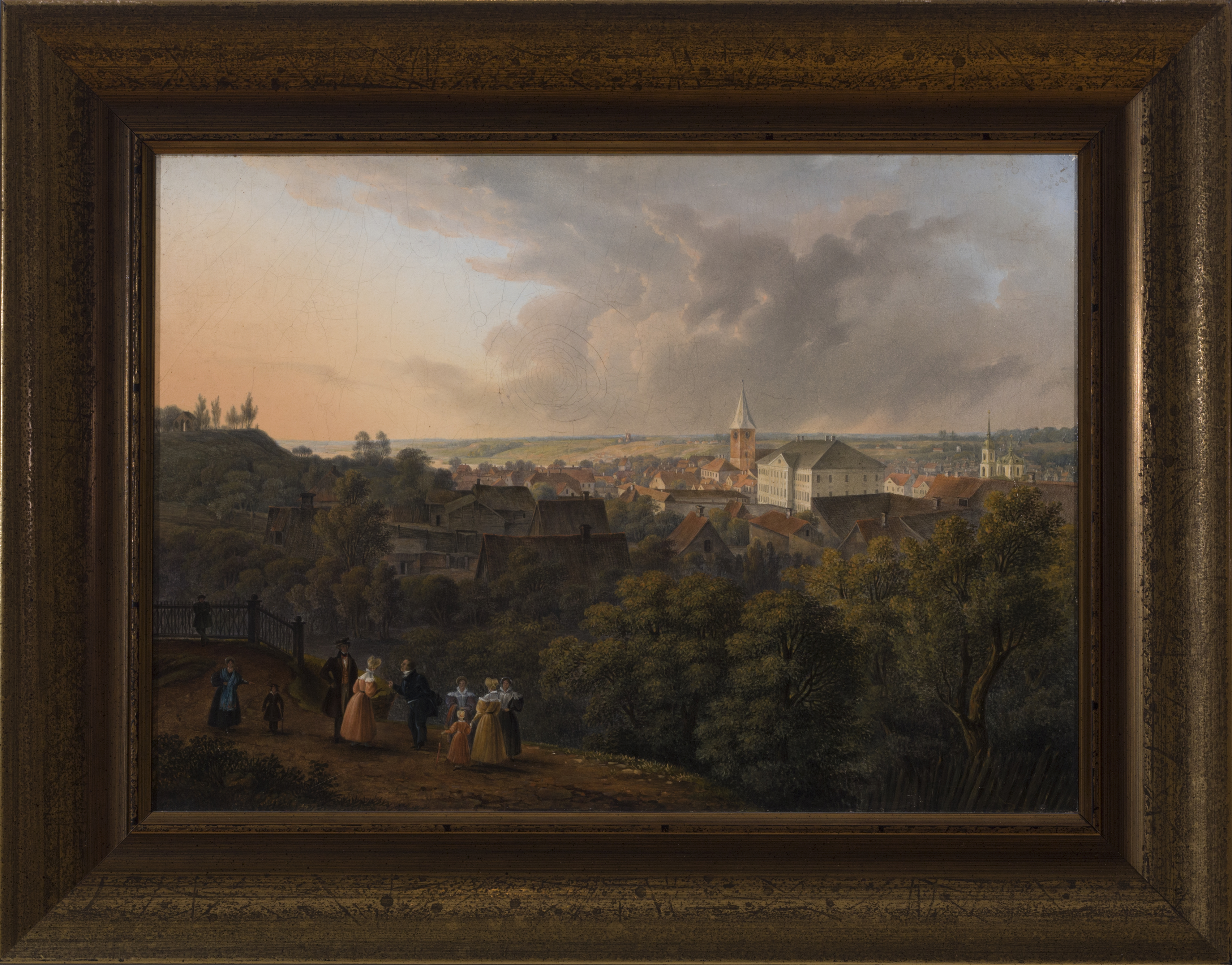 "Vaade Tartu Toomemäelt" (1850–1855). Õlimaal lõuendil. 29,3 x 41,5 cm. MUIS: TKM TR 4393 M 737 This image on crowdsourcing geotagging platform Ajapaik